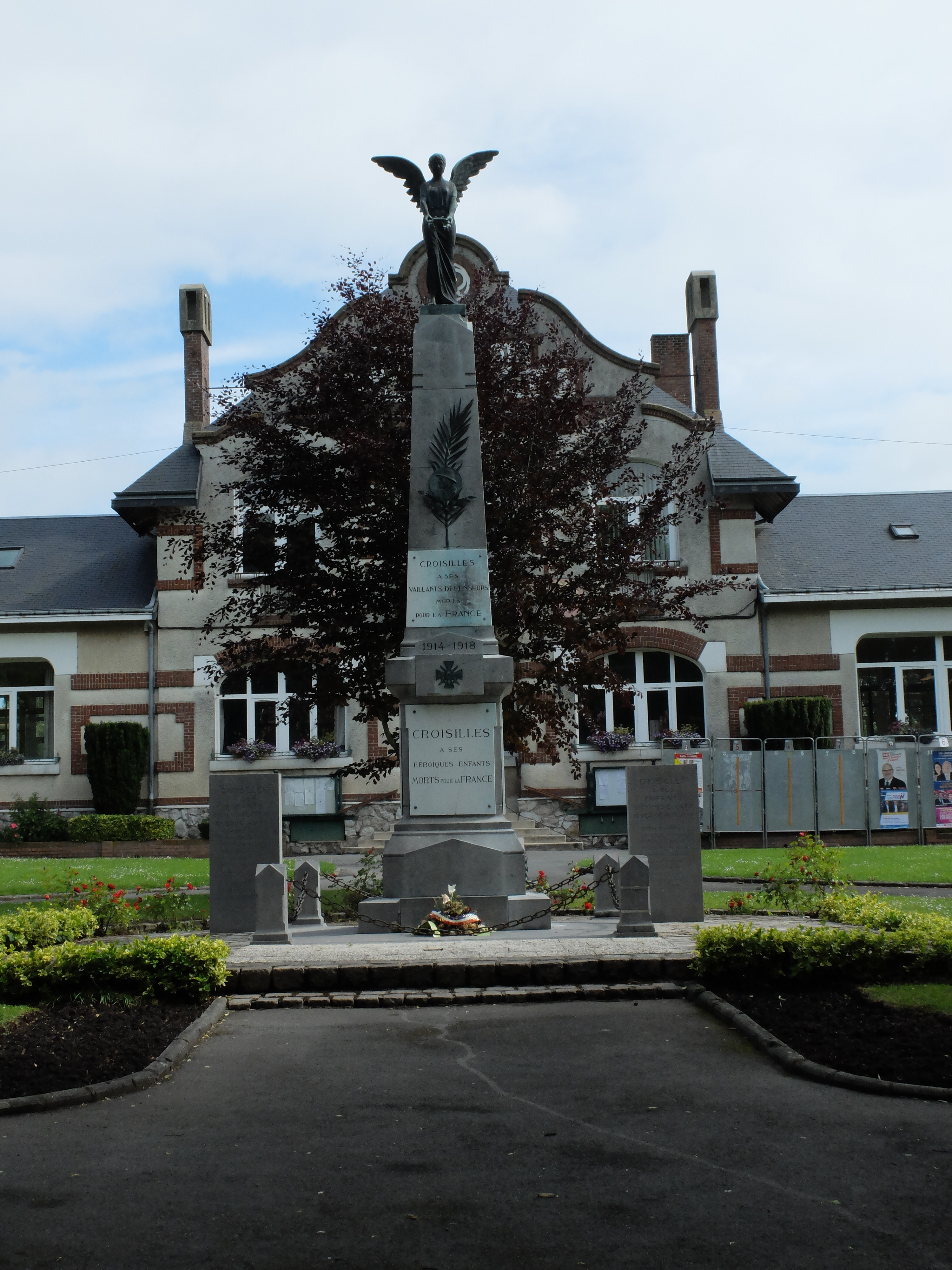 Vue du monument aux morts de Croisilles (62).